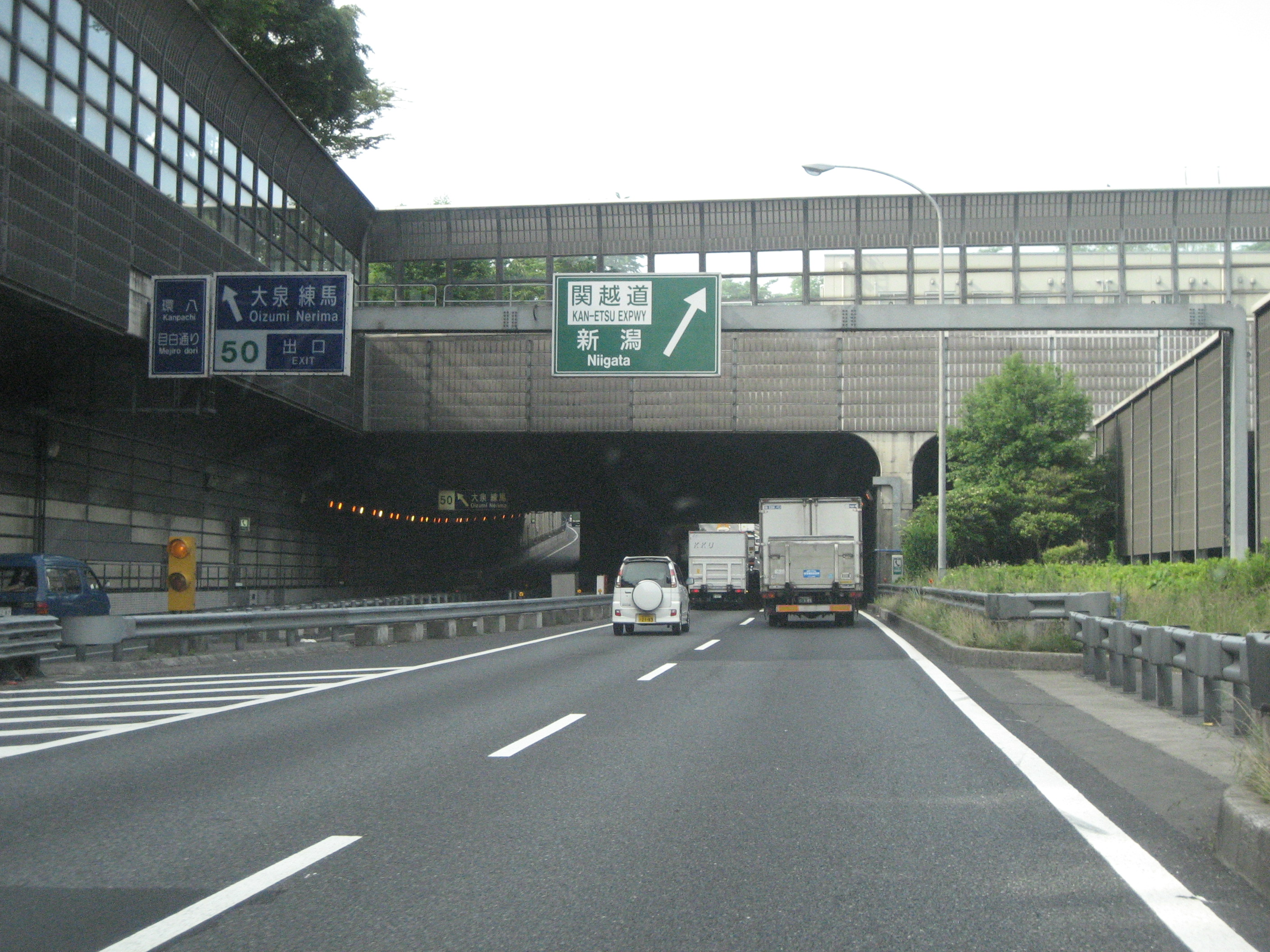 東京外環自動車道大泉IC（内回り出口）